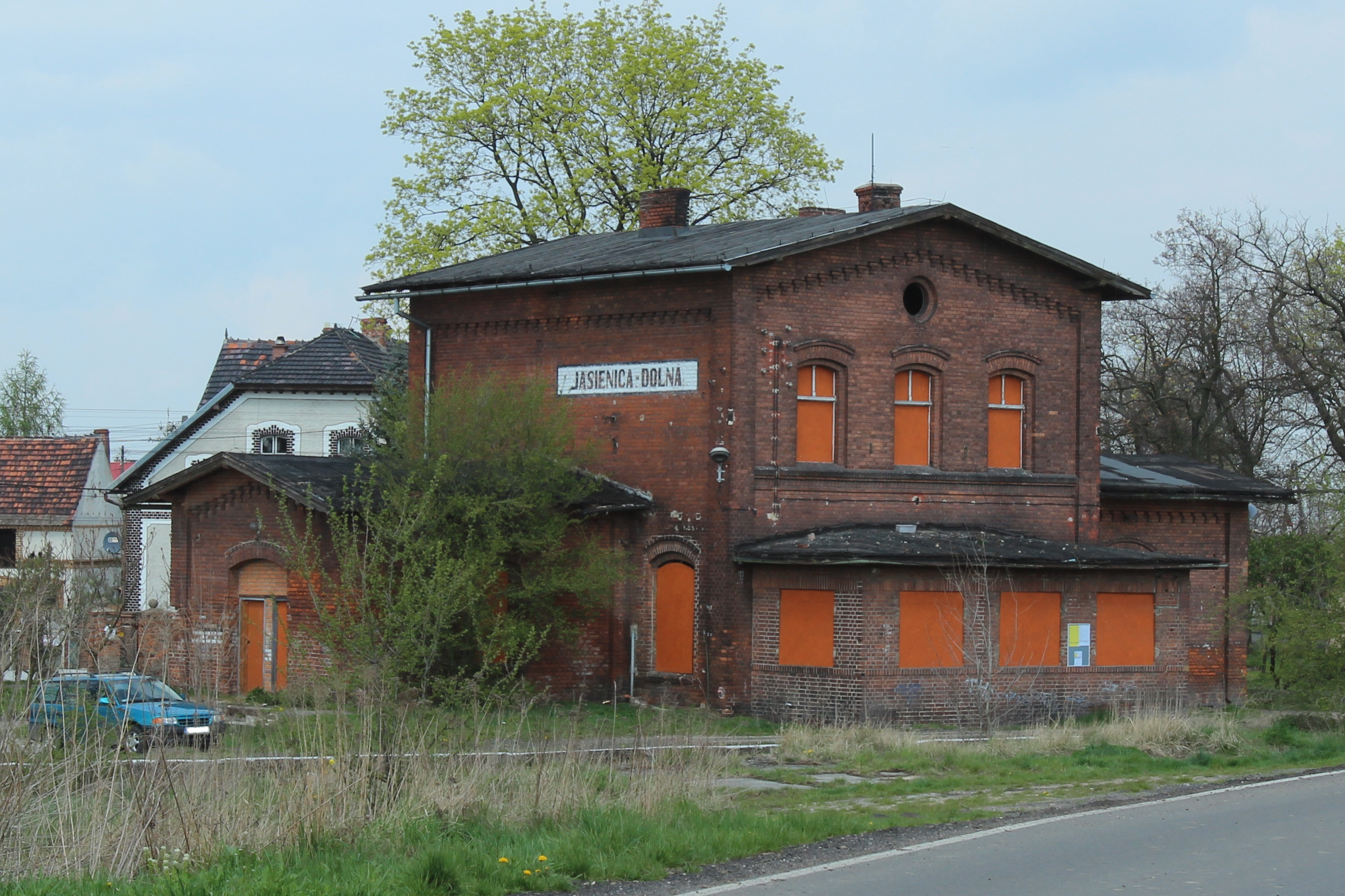 Jasienica Dolna – stacja kolejowa.